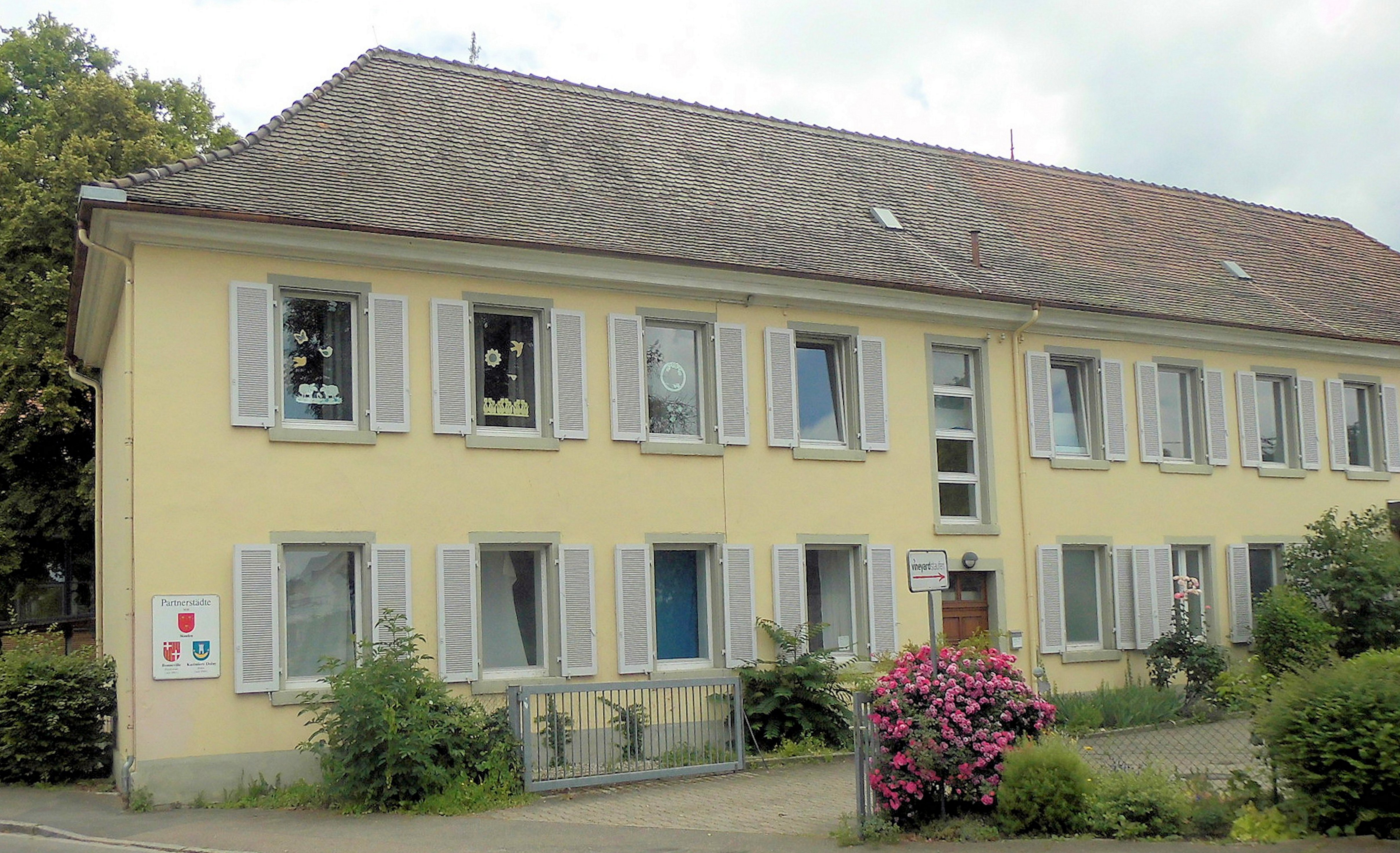 Gebäude des ehemaligen Kapuzinerklosters in Staufen im Breisgau, 1683-1685 erbaut; heute beherbergen die ehemaligen Klostergebäude unter anderem einen Jugendtreff, die Volkshochschule, eine Weinhandlung sowie das Jugendreferat der Stadtverwaltung